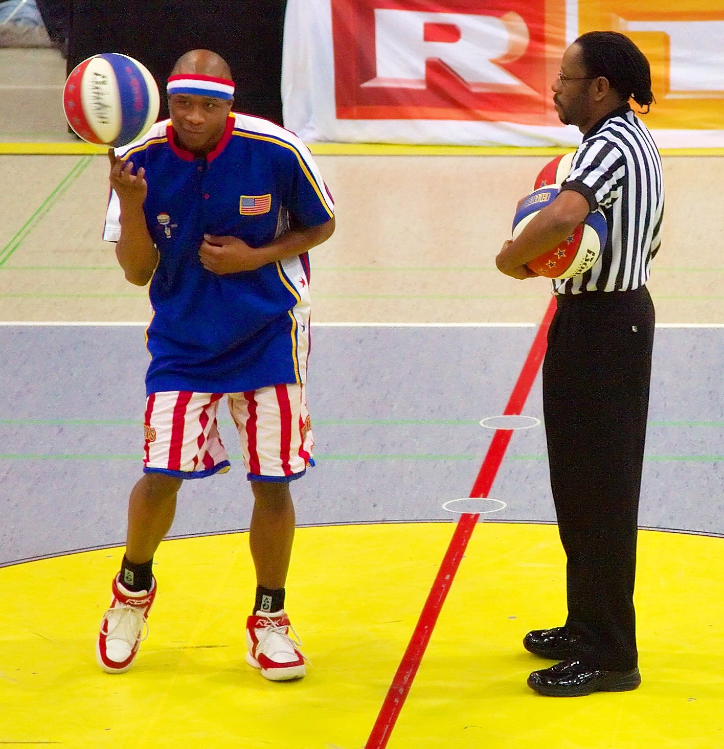 Harlem Globetrotters in Salzburg 29.03.2007